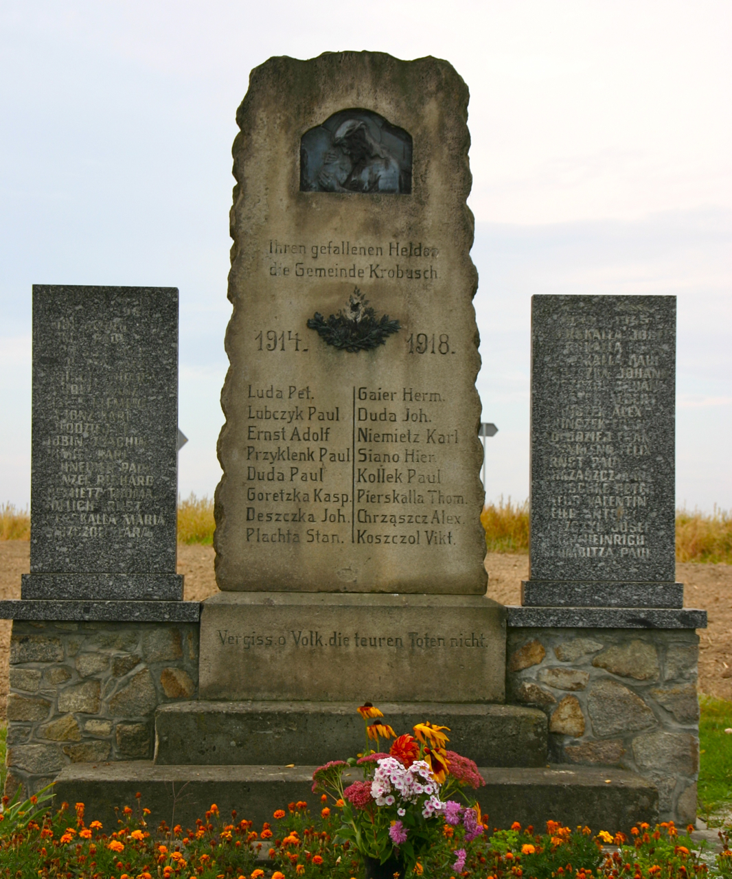 Krobusz (dodatkowa nazwa w j. niem. Krobusch – wieś w Polsce położona w województwie opolskim, w powiecie prudnickim, w gminie Biała.